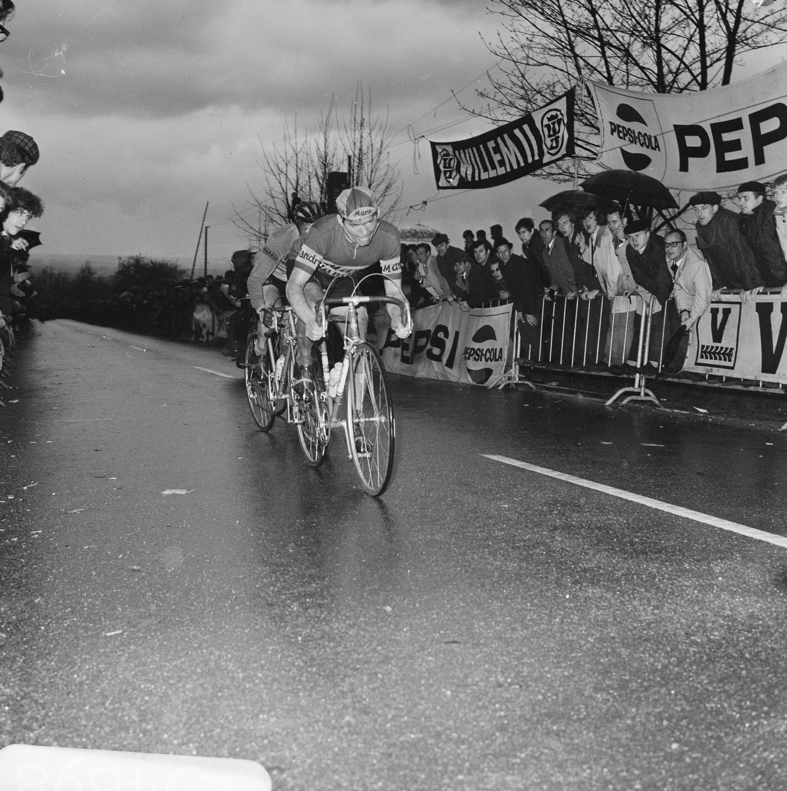 Collectie / Archief : Fotocollectie Anefo Reportage / Serie : Amstel Gold Race 1970 Beschrijving : Erik de Vlaeminck in aktie Datum : 25 april 1970 Trefwoorden : Amstel Gold Race, wielrennen Persoonsnaam : Vlaeminck, Erik de Fotograaf : Koch, Eric / Anefo Auteursrechthebbende : Nationaal Archief Materiaalsoort : Negatief (zwart/wit) Nummer archiefinventaris : bekijk toegang 2.24.01.03 Bestanddeelnummer : 923-4698